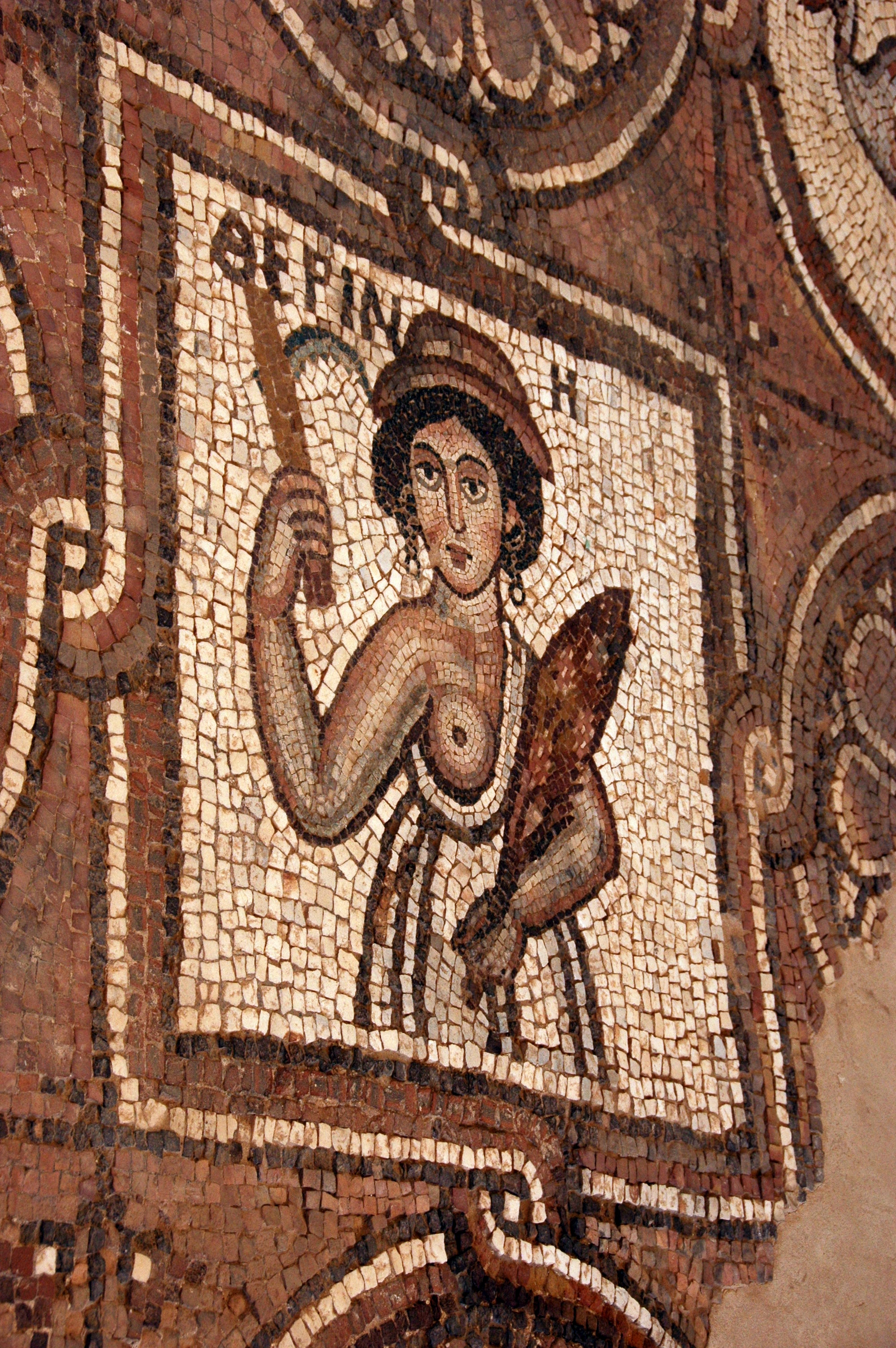 Original.